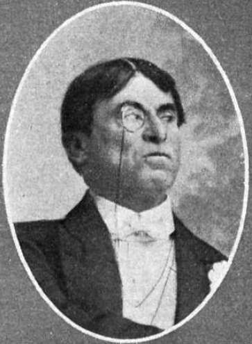 Fotografía del actor español José Moncayo publicada en 1912, cuando representaba El príncipe Casto en el Teatro Apolo.